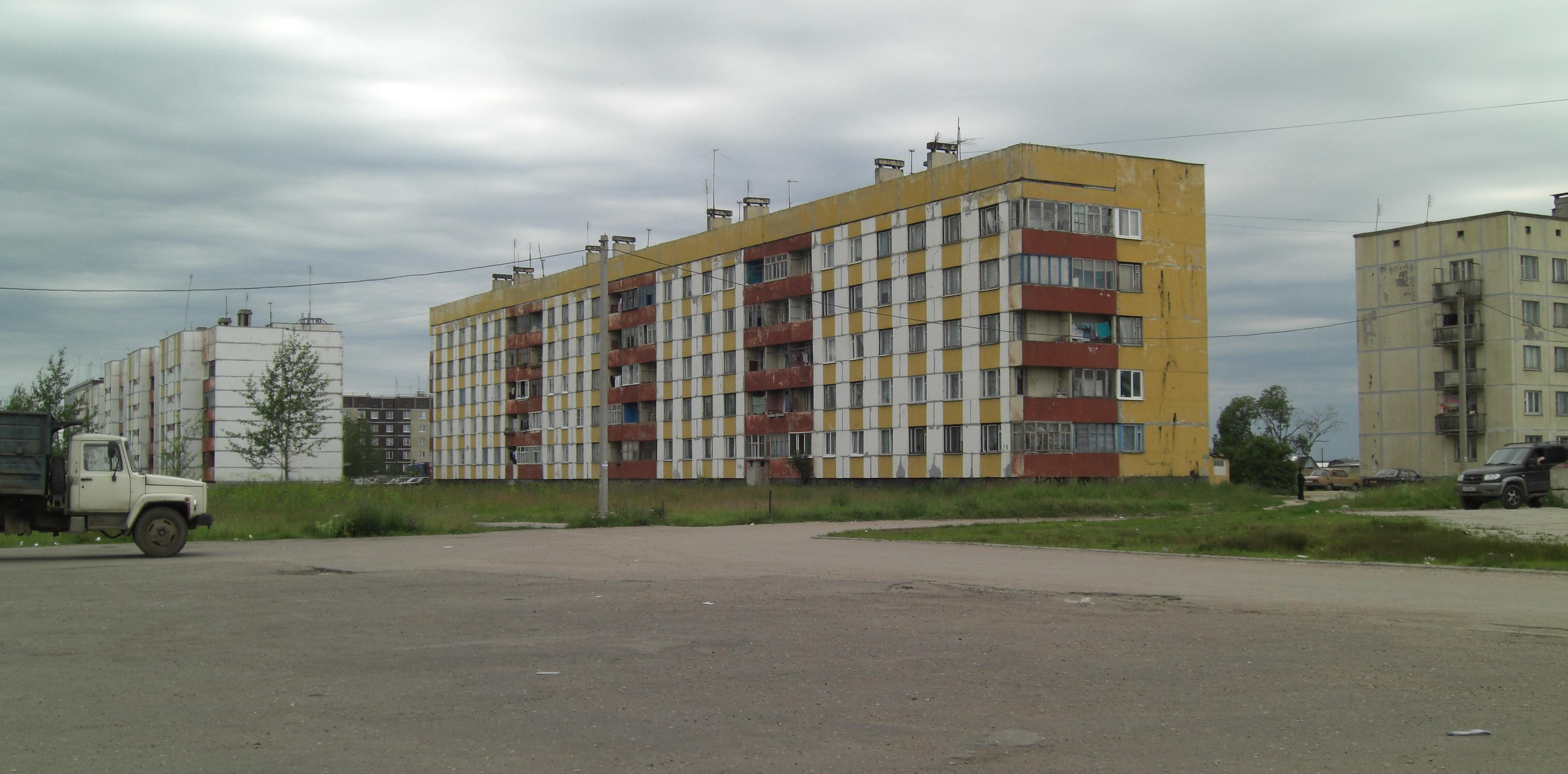 Деревня Бегуницы Волосовского района Ленинградской области